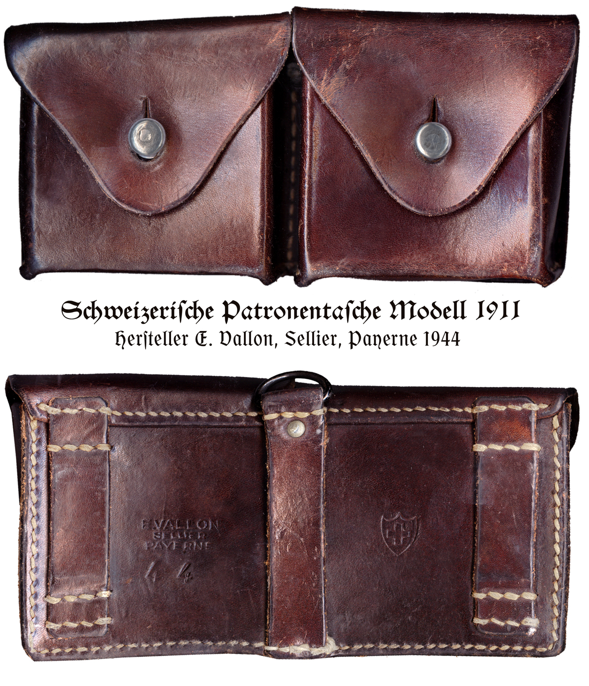 Swiss Army cartridge pocket M1911/Schweizerische Patronentasche M1911